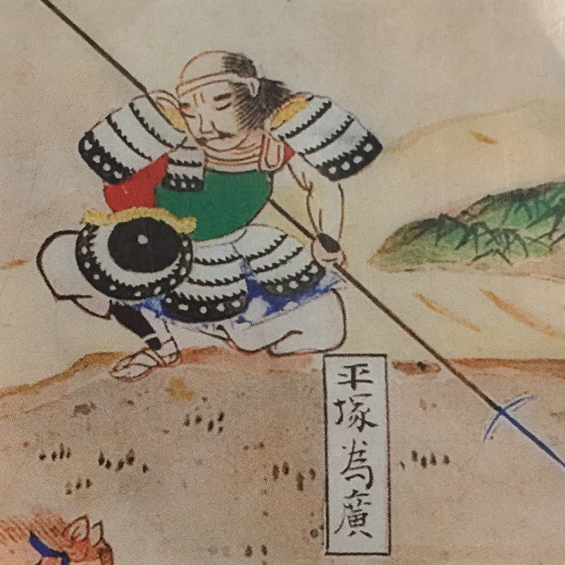 関ヶ原合戦図屏風（関ケ原町歴史民俗資料館本）に描かれた、豊臣家家臣の平塚為広。